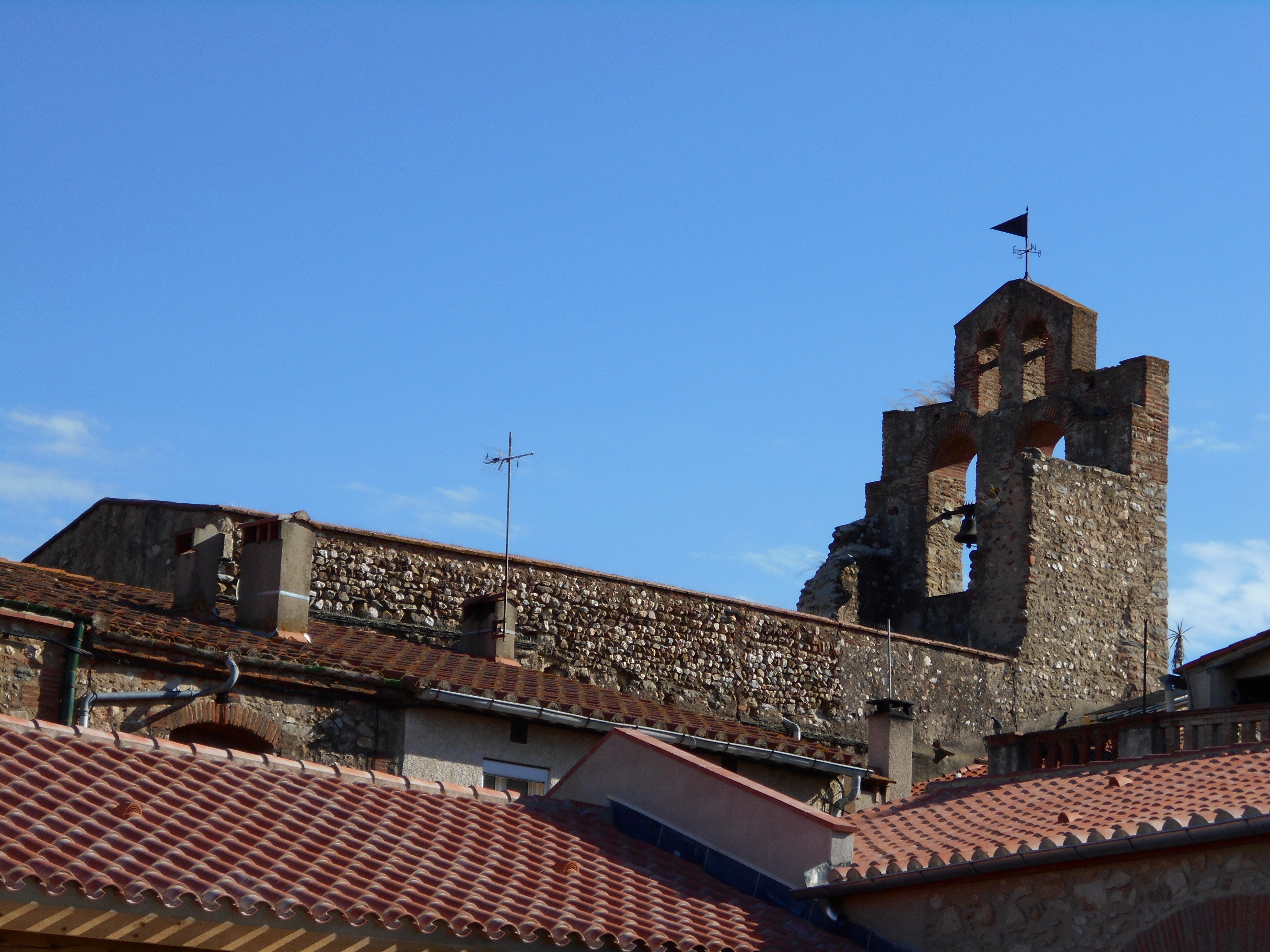 L'església de Sant Tomàs de Llupià des de lluny